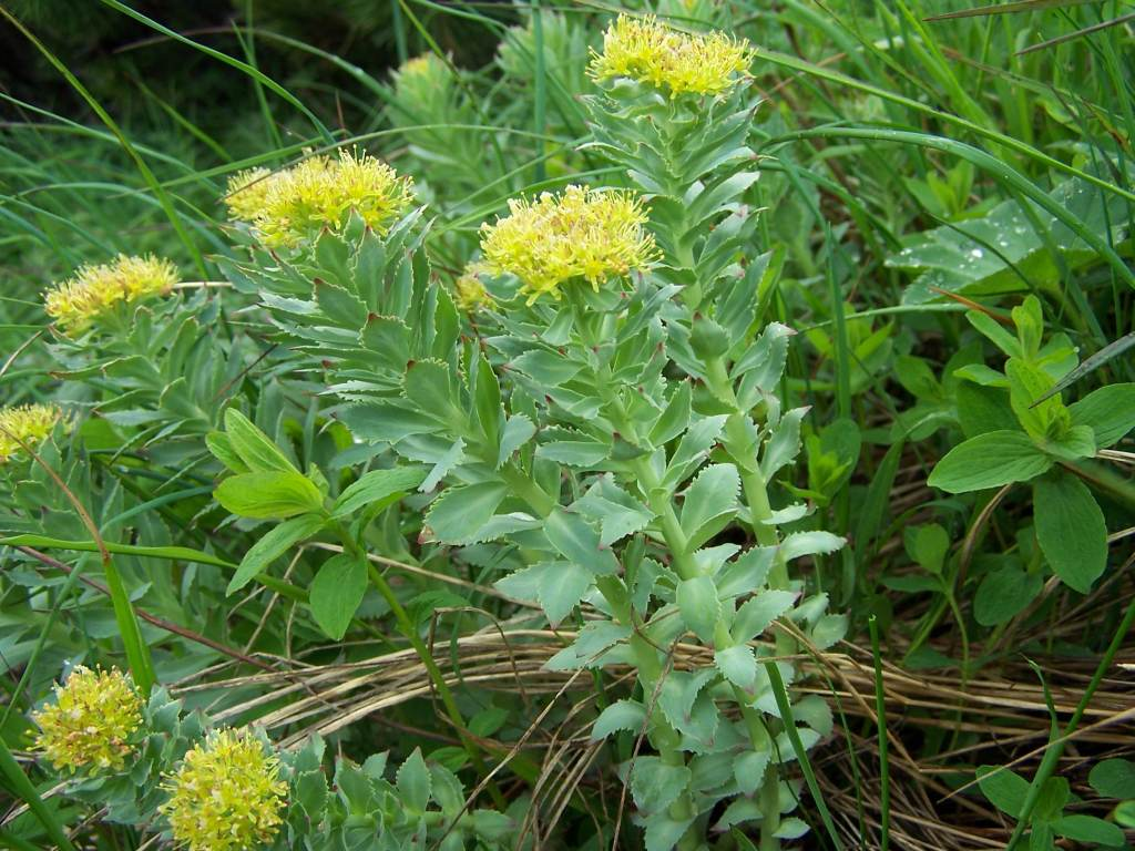 Rhodiola rosea (pl. różeniec górski), habitat: Tatra Mountains, Dolina Tomanowa